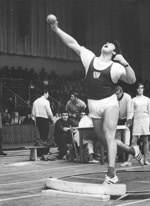 Hartmut Briesenick Zentralbild Mittelstädt 15.02.1971 Berlin:DDR-Leichtathletik-Hallenmeisterschaften 1971 in der Berliner Dynamo-Sporthalle-Mit 20,40 m verbesserte Hartmut Briesenick (SC Dynamo Berlin) seinen eigenen Hallen-Europarekord um 18 cm (am 14.02.1971) .